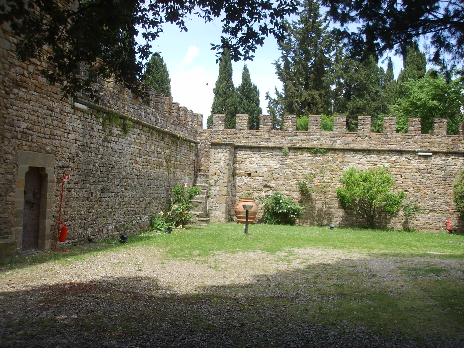 Castel di poggio, corte